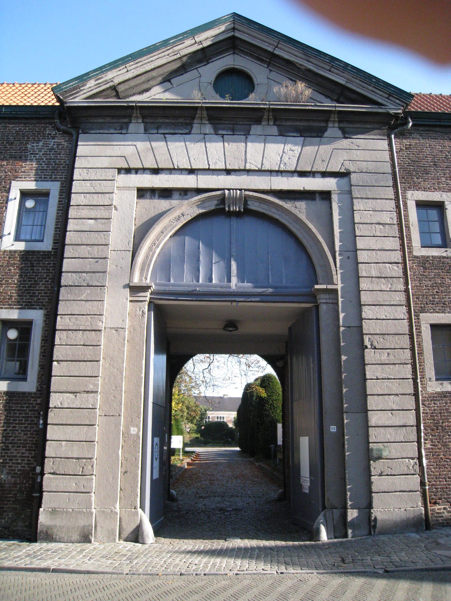 Toegangspoort begijnhof Hasselt, 2007